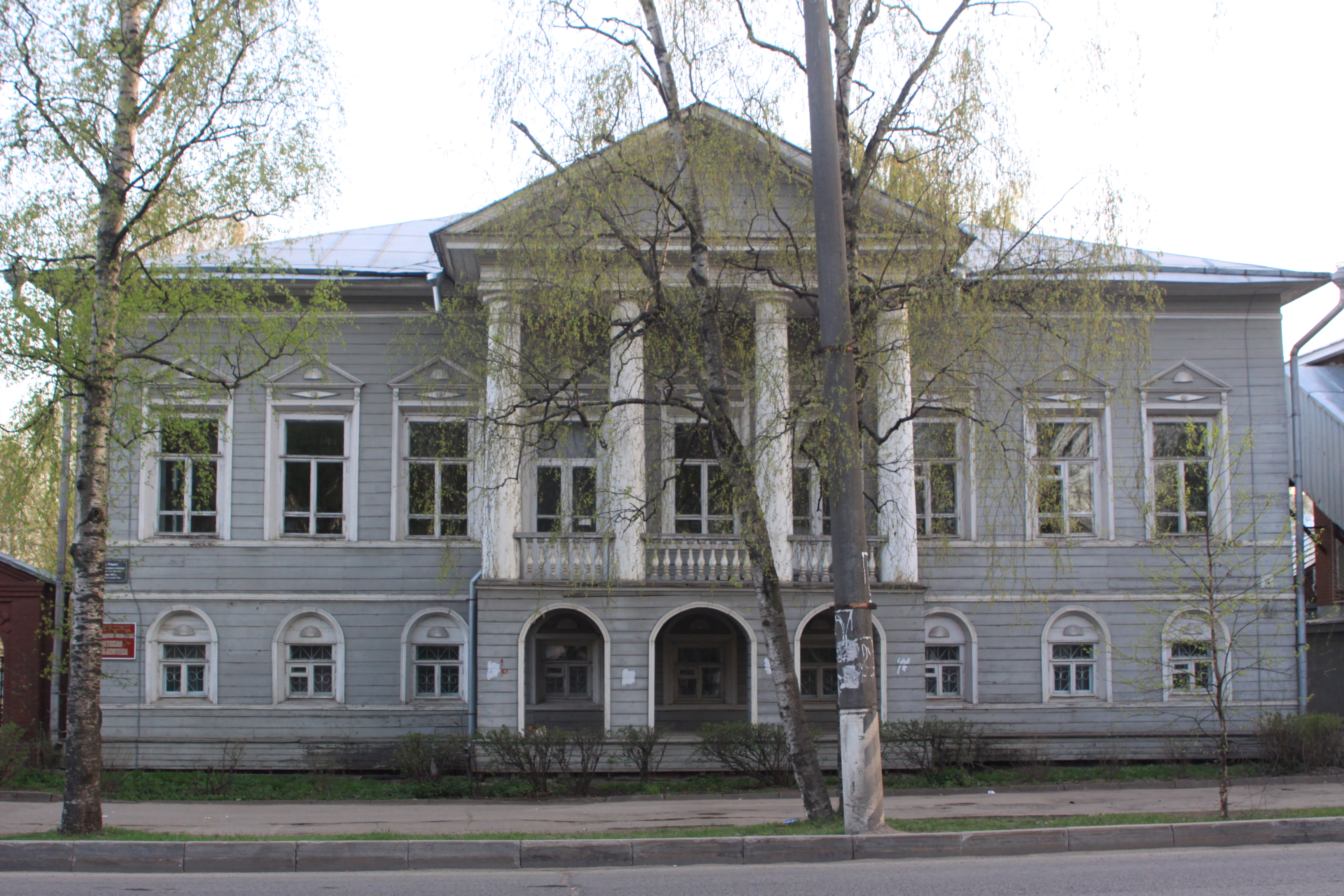 Дом Юшина в Вологде (середина XIX века)